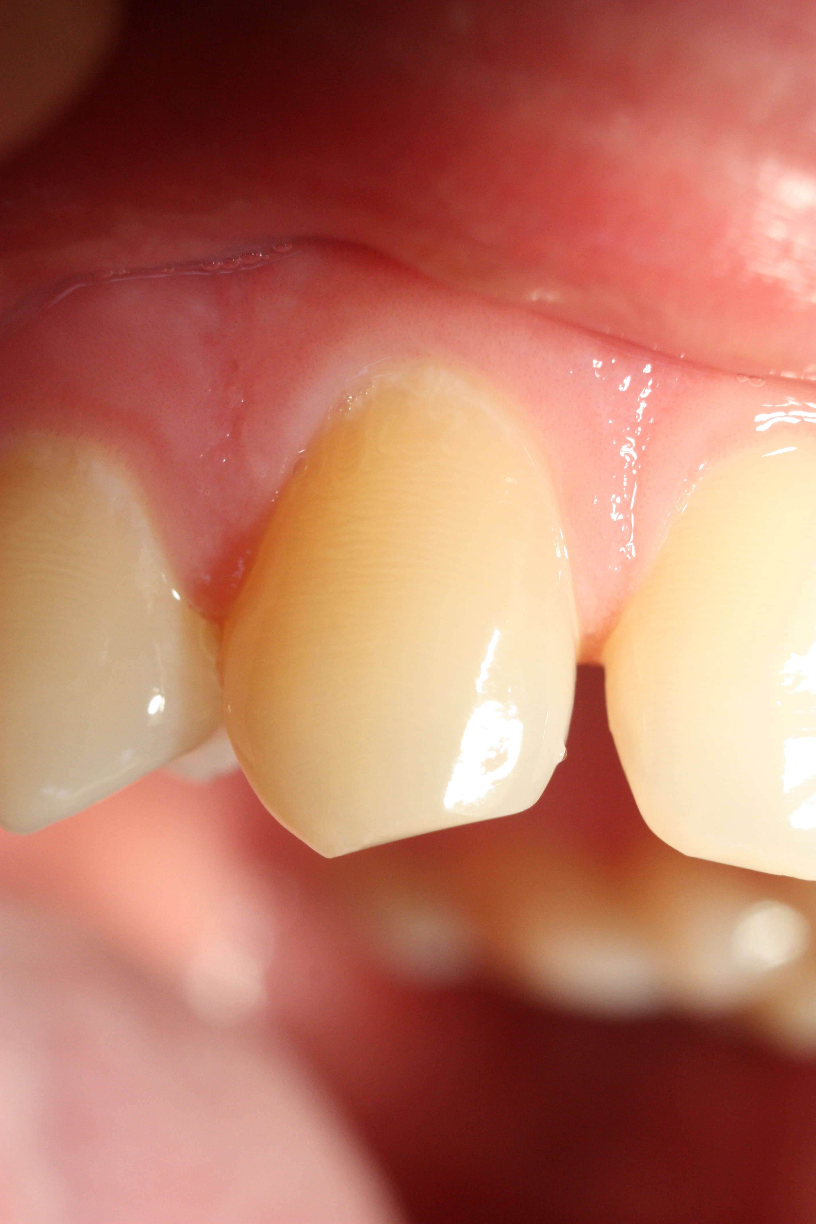 Retzius-Lines; Oberkiefer Frontzahn, Alter: 21 Jahre, starke Abrasion; Retzius-Linien in der vollen Bildauflösung gut zu erkennen: periodische Linien ("Querstreifung"), zurückzuführen auf Mineralisationsunterschiede während der Amelogenese. Der Abstand schwankt von Linie zu Linie zwischen 4 und 150 μm. Die Retziusstreifen beruhen häufiger auf einer Hypomineralisation als auf einer Hypermineralisation. Von struktureller Bedeutung aller temporären Zähne ist die Neonatallinie, die Grenze zwischen prä- und postnatal gebildetem Schmelz. Sie stellt entwicklungsgeschichtlich und ontogenetisch die erste Retziuslinie im laktalen Zahn dar.